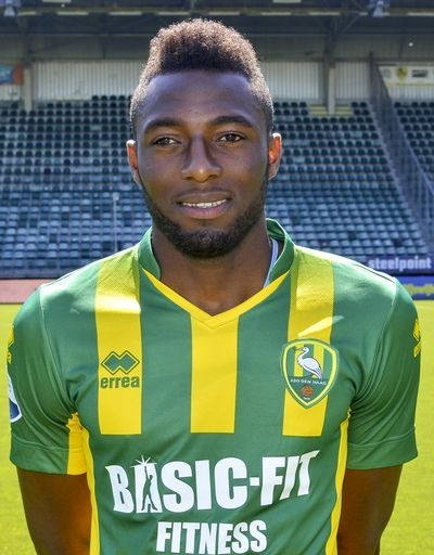 Wilfried Kanon